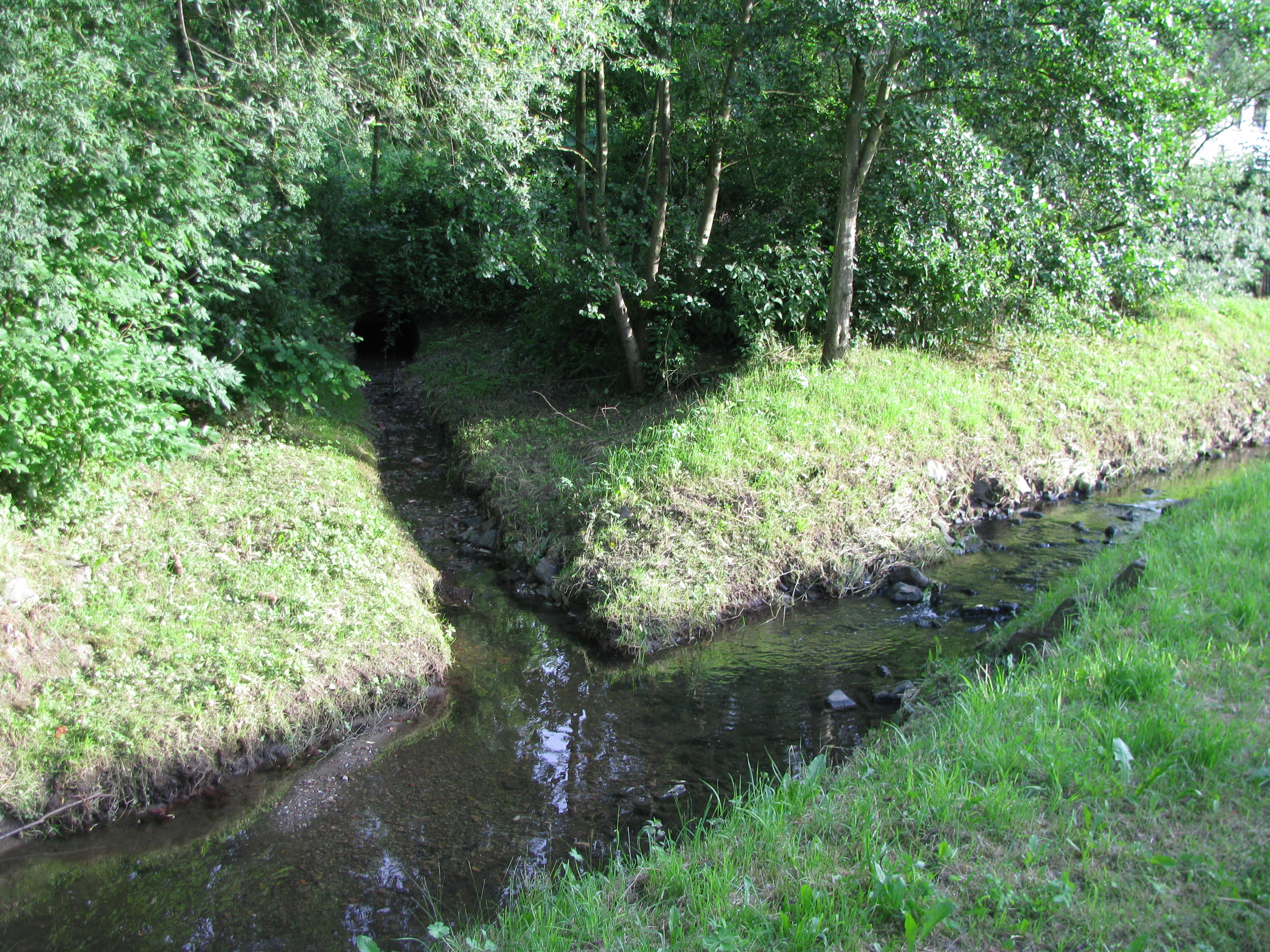 an dieser Stelle mündet der Eselsgraben in den Grunnelbach